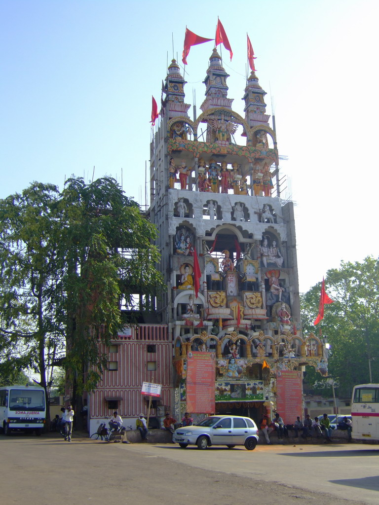 Tempio indù presso stazione ferroviaria di Raipur (India)